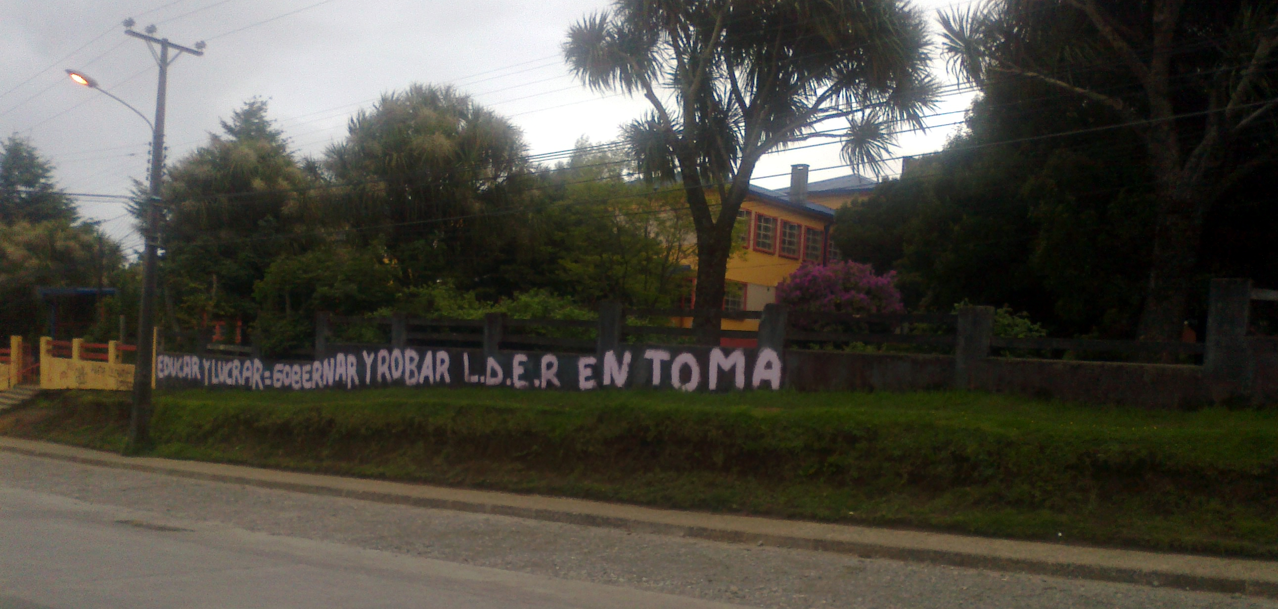 Graffiti hecho en una escuela de Ancud (Chile) durante las movilizaciones estudiantiles de 2011: "EDUCAR Y LUCRAR = GOBERNAR Y ROBAR L.D.E.R EN TOMA".